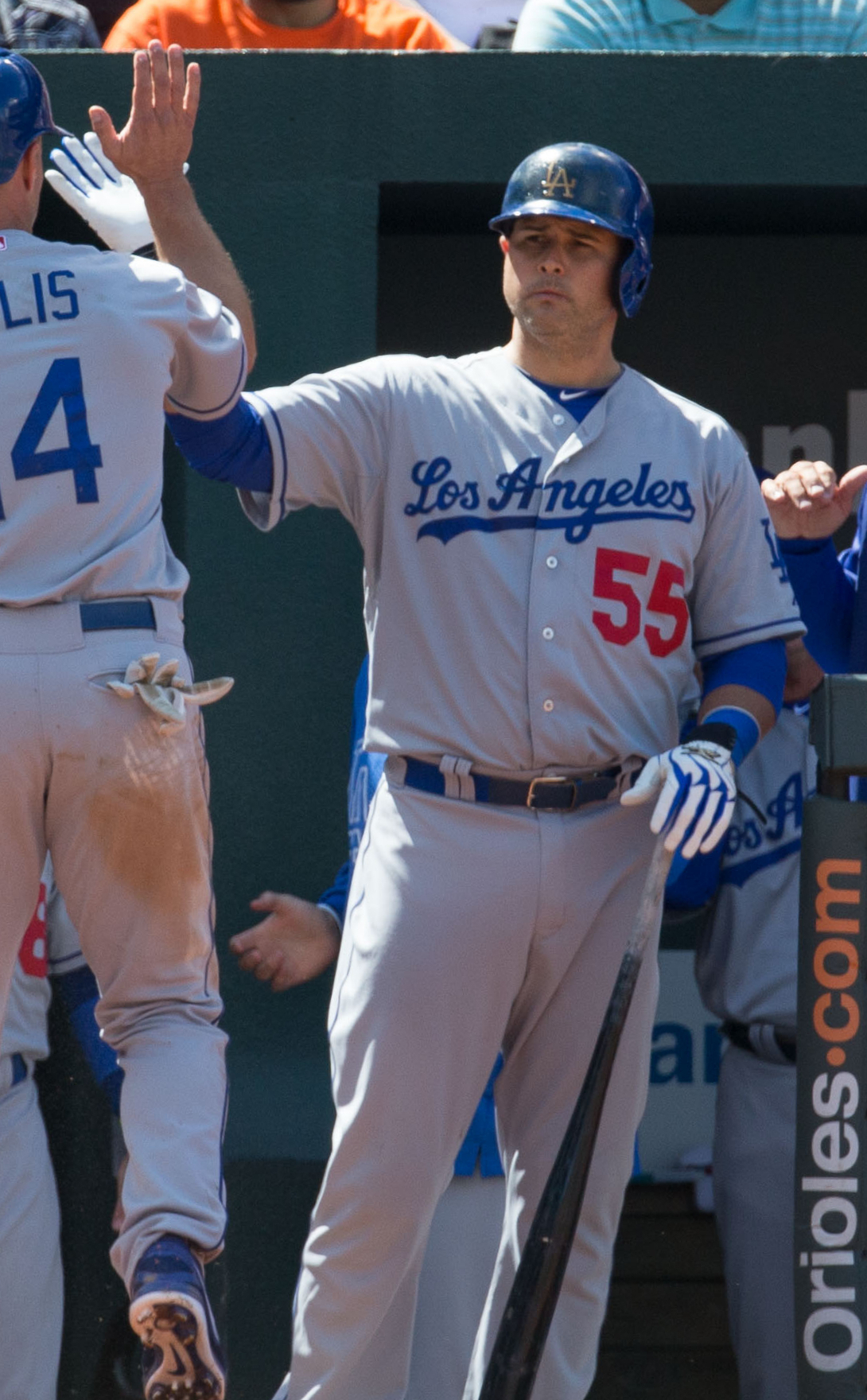 Ramón Hernández